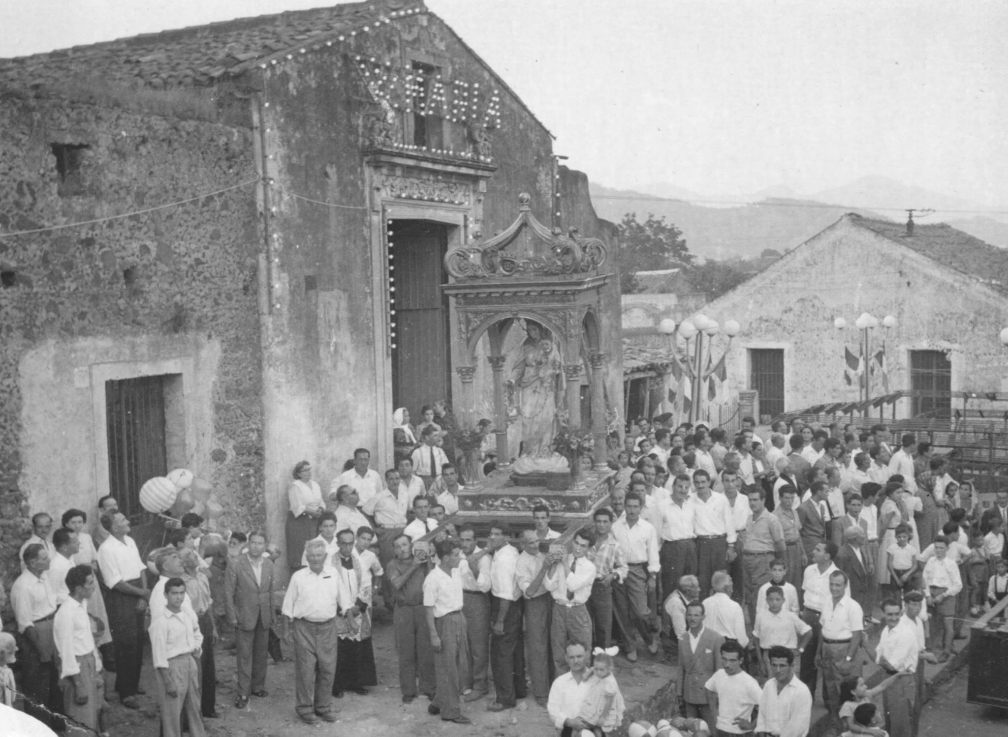 La festa di Maria SS. della Catena del'45 con l'antica chiesetta di Castello - Fiumefreddo di Sicilia